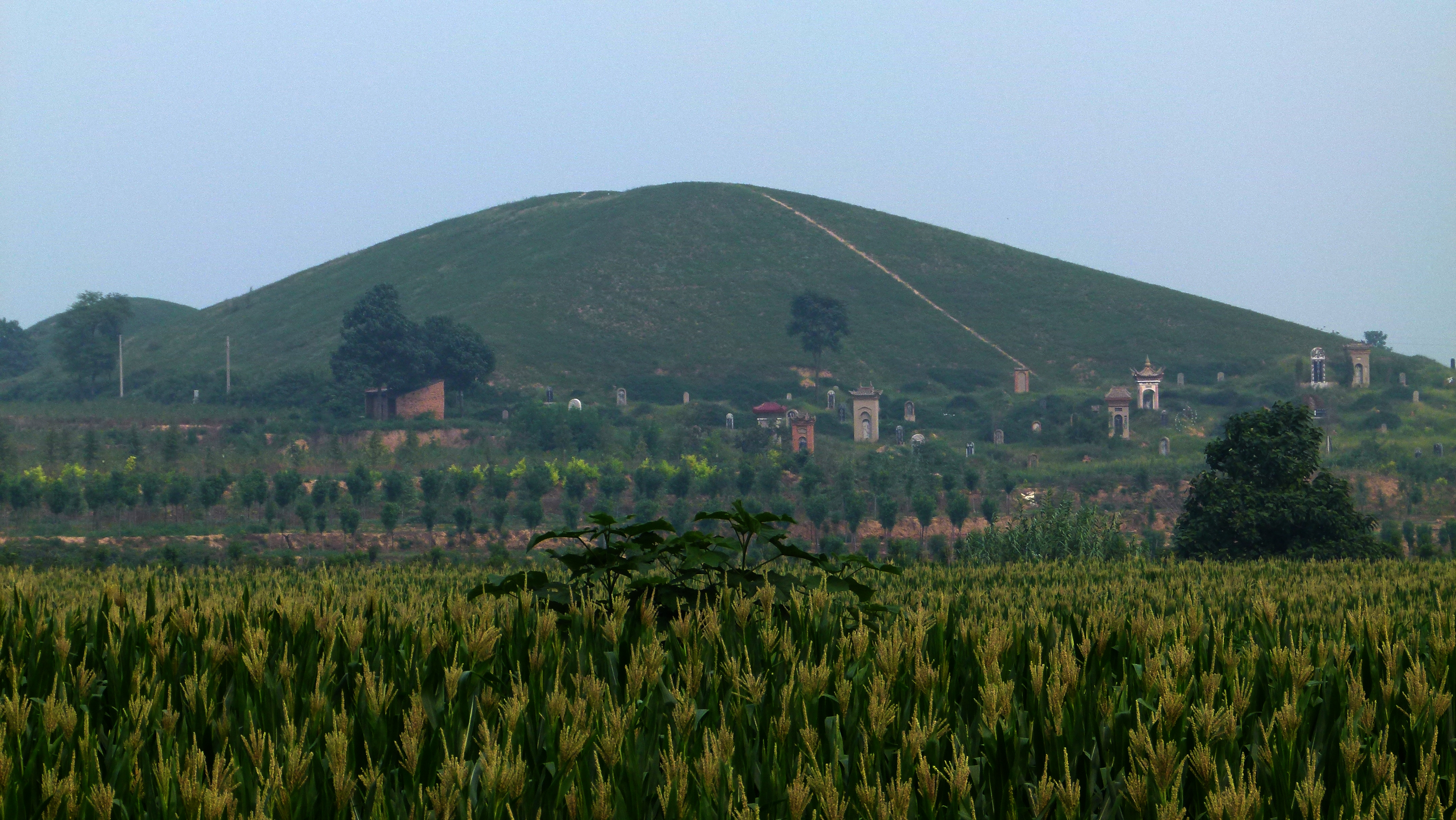 Anling - Grab der Kaiserin